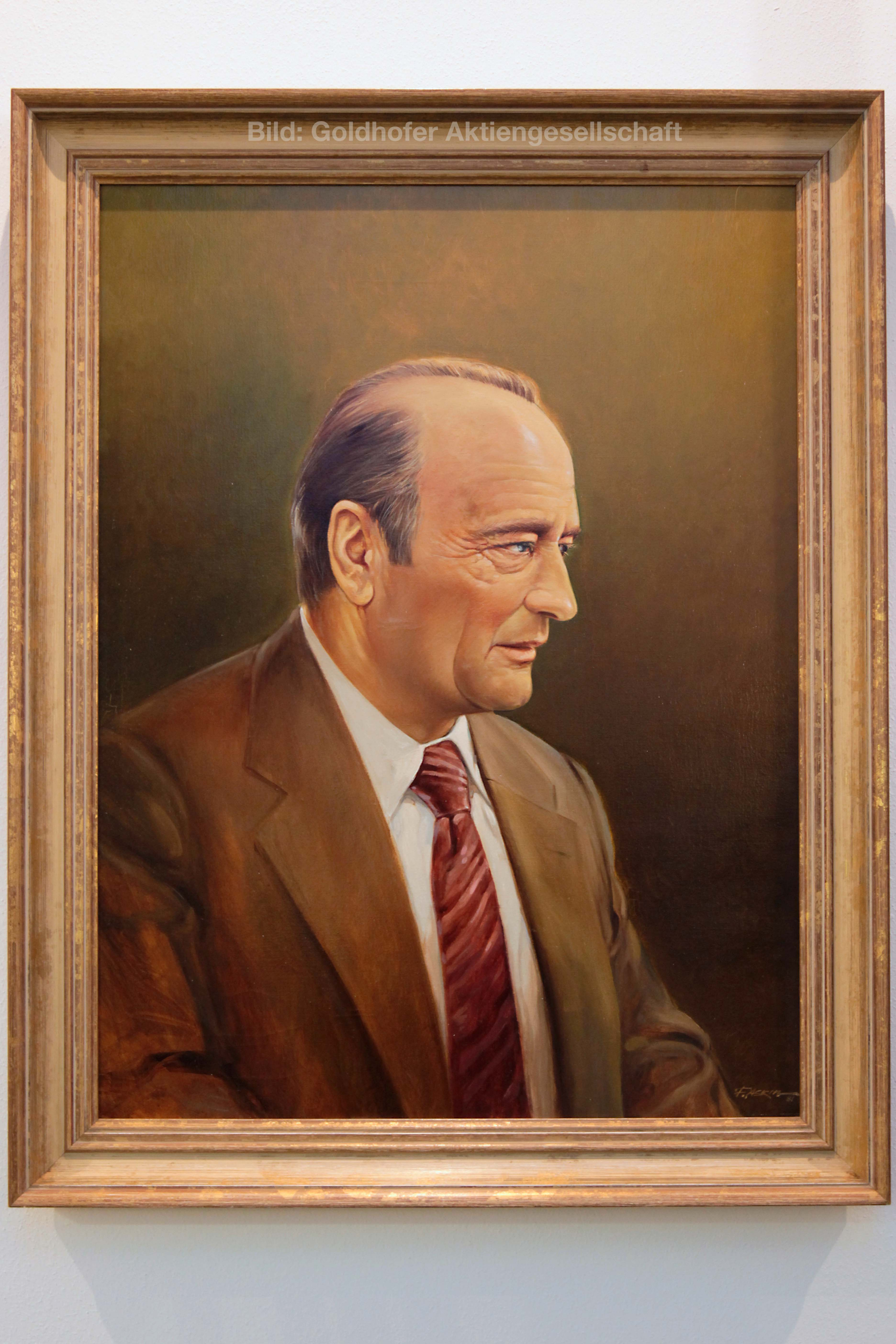 Portrait von Alois Goldhofer